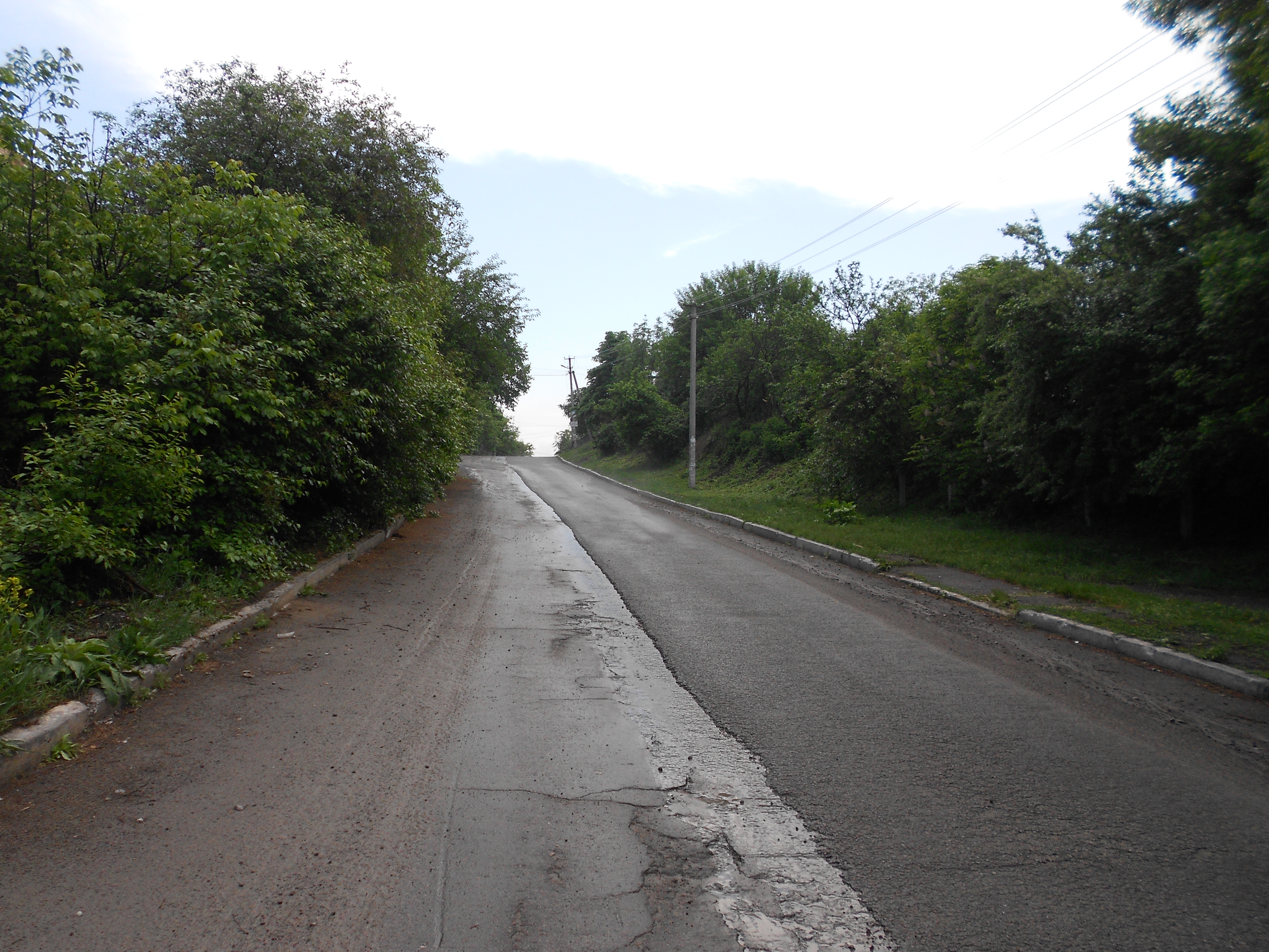 Krushynka17-05-2013UsovaGoraDSCN1369